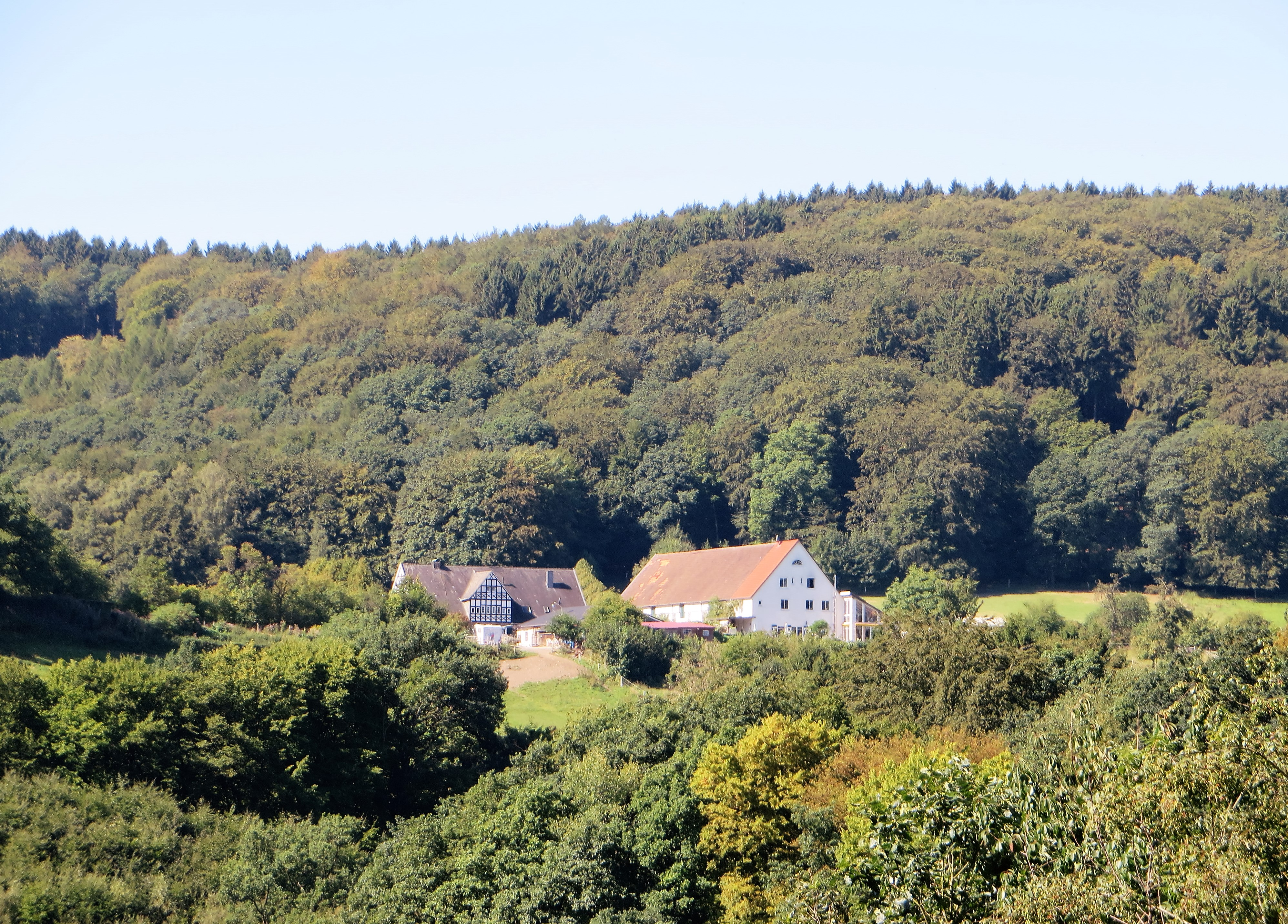 Blick auf den Ribberthof in Hagen-Dahl. Der ehemalige Gutshof gilt als einer der ältesten Wohnplätze von Hagen. Der Erzbischof von Köln übereignete ihn 1096 der Abtei Siegburg. Heute ist hier ein Reiterhof. In unmittelbarer Nähe befindet sich auf dem Minnerberg das Kulturdenkmal Wallburg Ambrock. Der abgebildete Bereich liegt im Landschaftsschutzgebiet „Eilper Berg/Langenberg“.